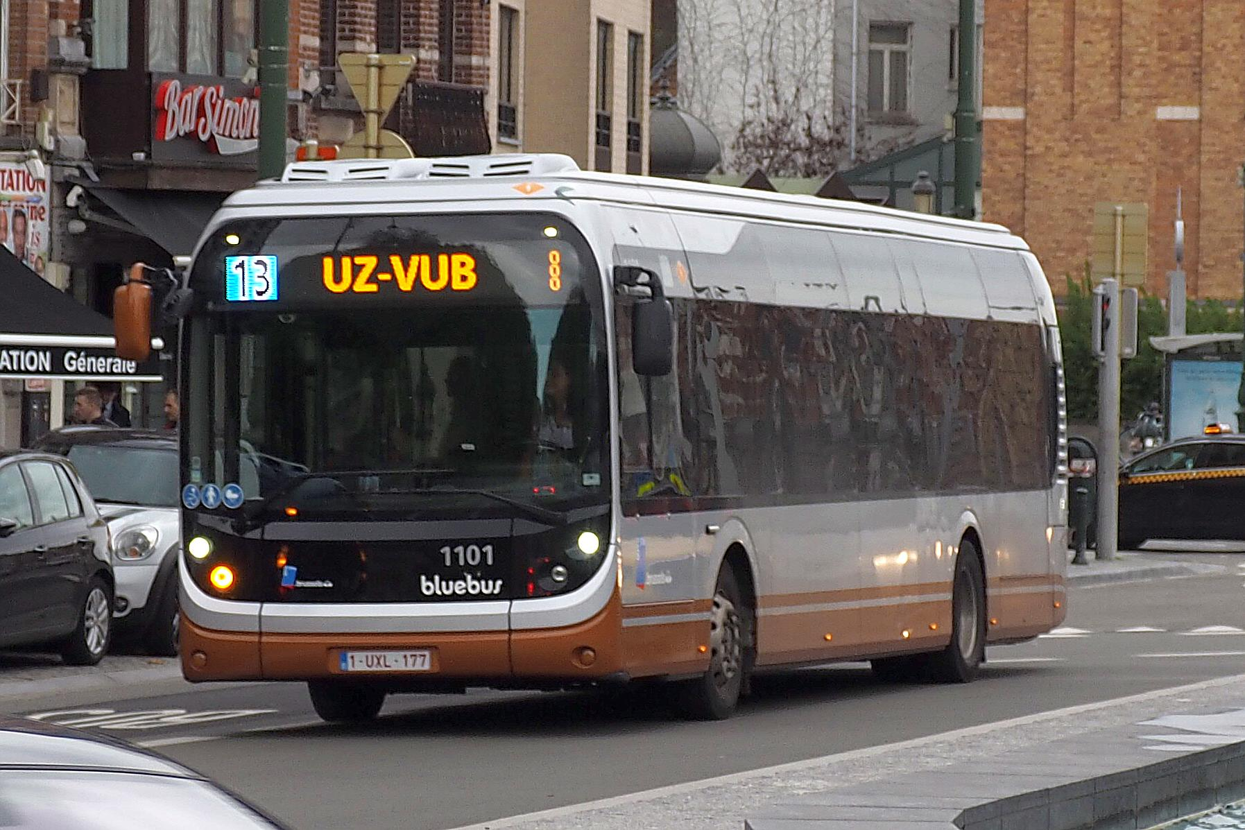 Elektrische stadtsbus Bolloré Bluebus SE, no. 1101, kenteken 1-UXL-177, van de MIVB, Brussel, België, die ingezet wordt op de lijn 13 tussen Simonis en het Universitair Ziekenhuis Brussel.